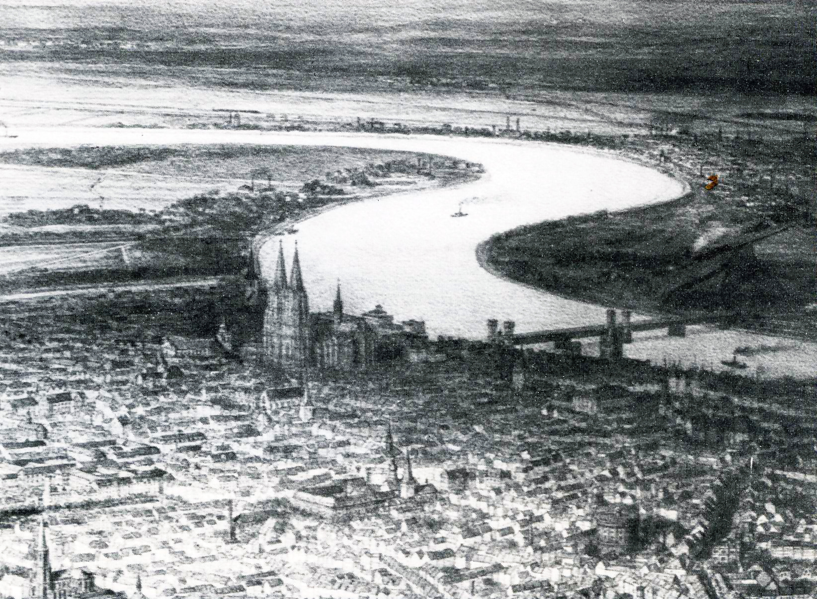 Köln 1886 nach einem Aquarell von Jakob Scheiner. Ausschnitt aus seiner in Auftrag der Stadt gefertigten Vogelschauperspektive